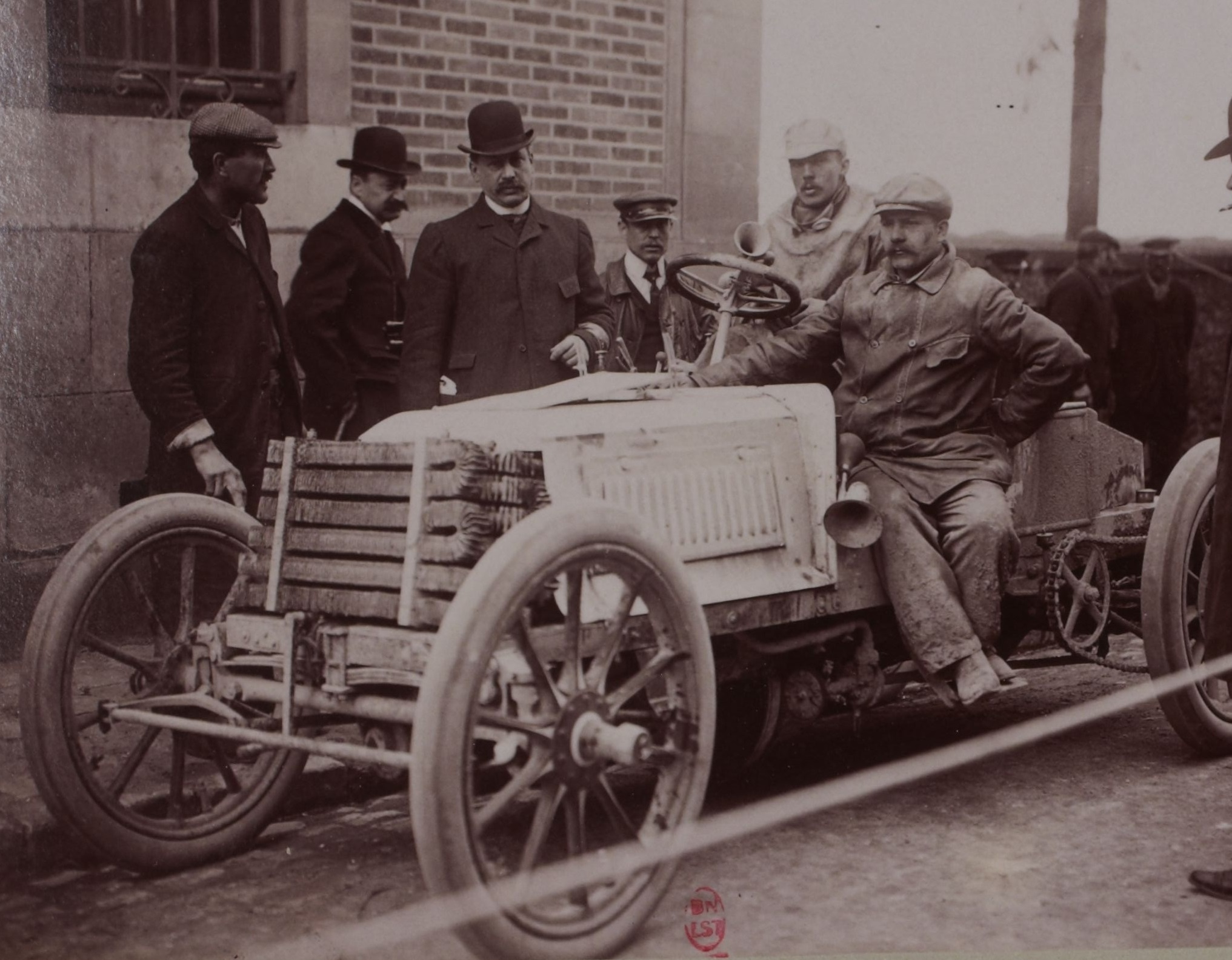 [Collection Jules Beau. Photographie sportive] : T. 17. Année 1902 / Jules Beau : F. 39v. [Course de vitesse], Saint-Germain, 16 mai 1902